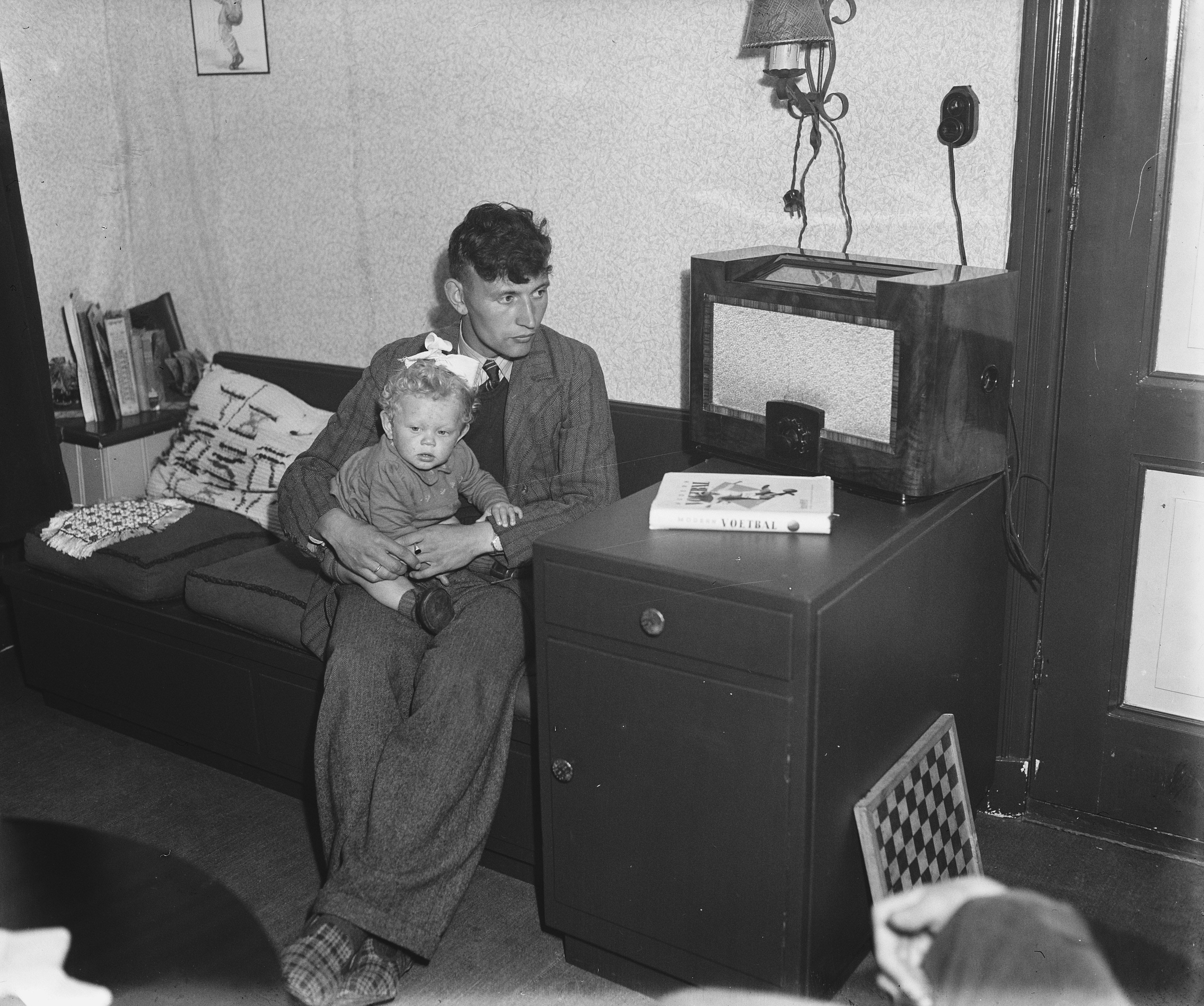 Collectie / Archief : Fotocollectie Anefo Reportage / Serie : [ onbekend ] Beschrijving : Abe Lenstra naar de radio luisterend Datum : 26 mei 1948 Persoonsnaam : Lenstra, Abe Fotograaf : Merk, Ben / Anefo Auteursrechthebbende : Nationaal Archief Materiaalsoort : Glasnegatief Nummer archiefinventaris : bekijk toegang 2.24.01.09 Bestanddeelnummer : 902-7676